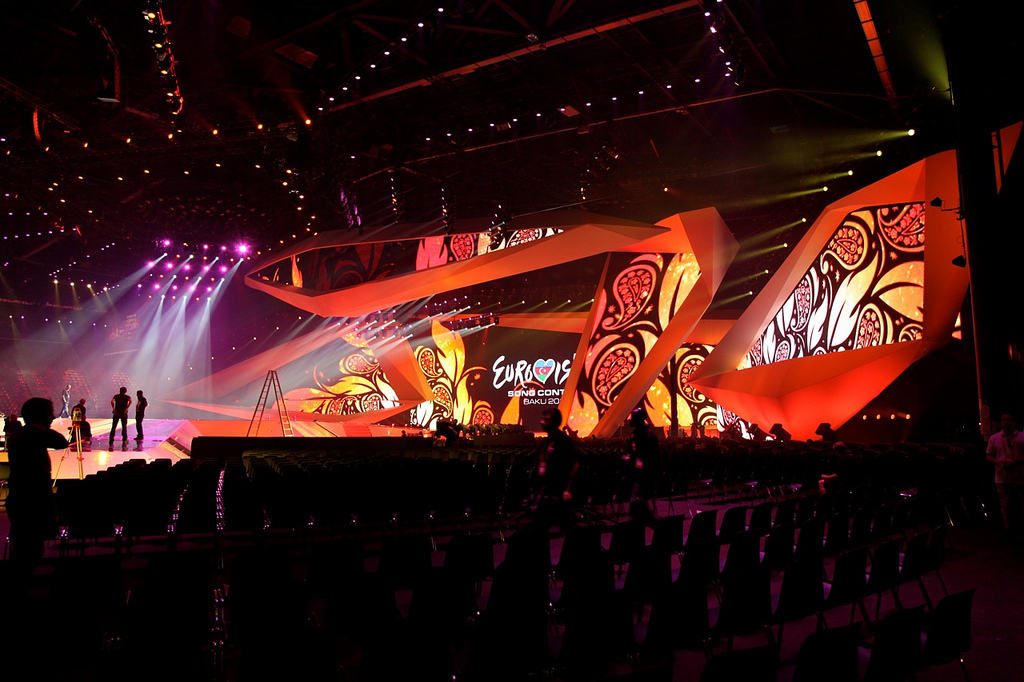 Crystal Hall Baku Eurovision Inside